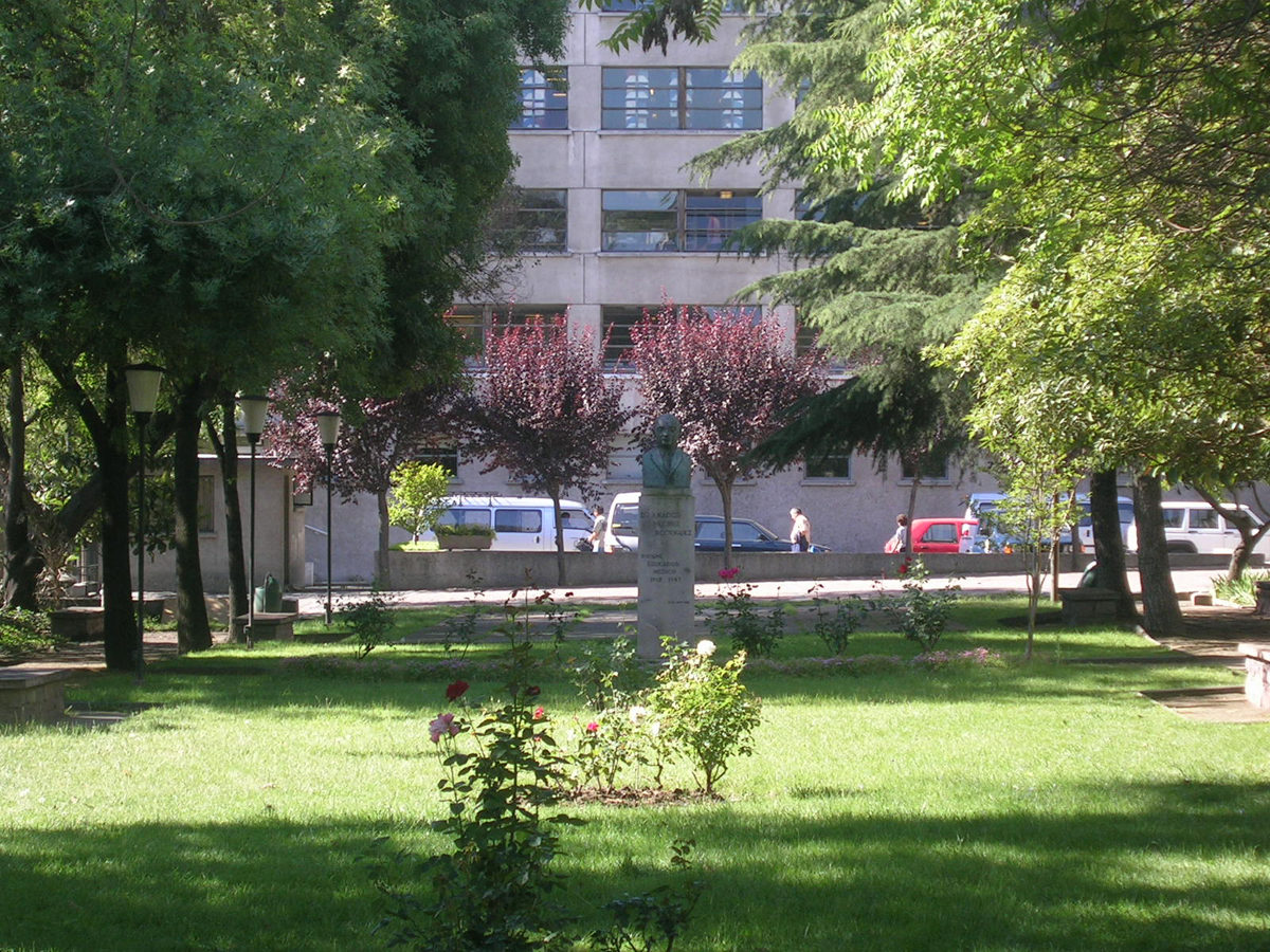 Plazoleta Dr. Amador Neghme. Interior Facultad de Medicina Universidad de Chie